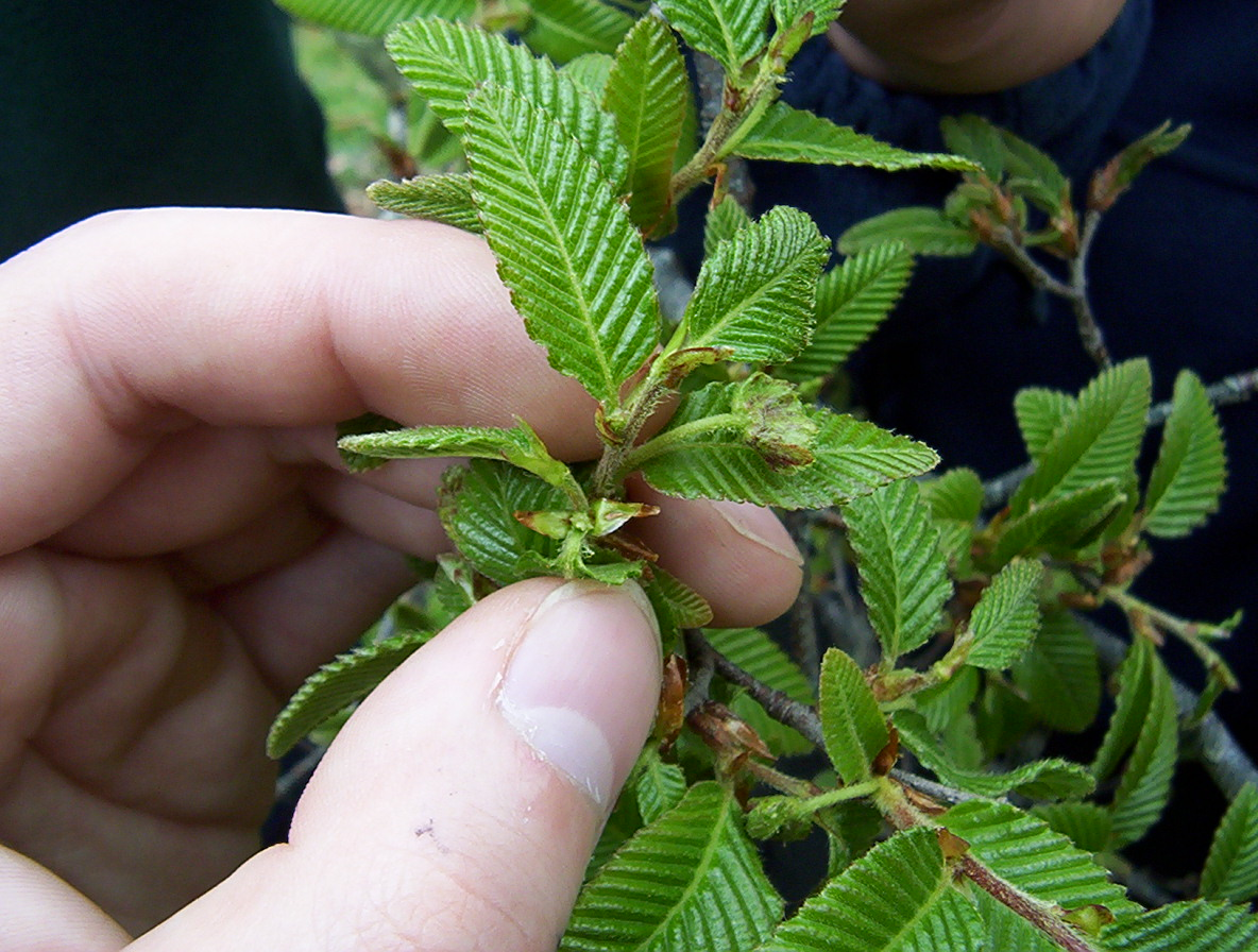 Flor femenina de Nothofagus alpina (Raulí) obtenida en la provincia de Valdivia, Chile